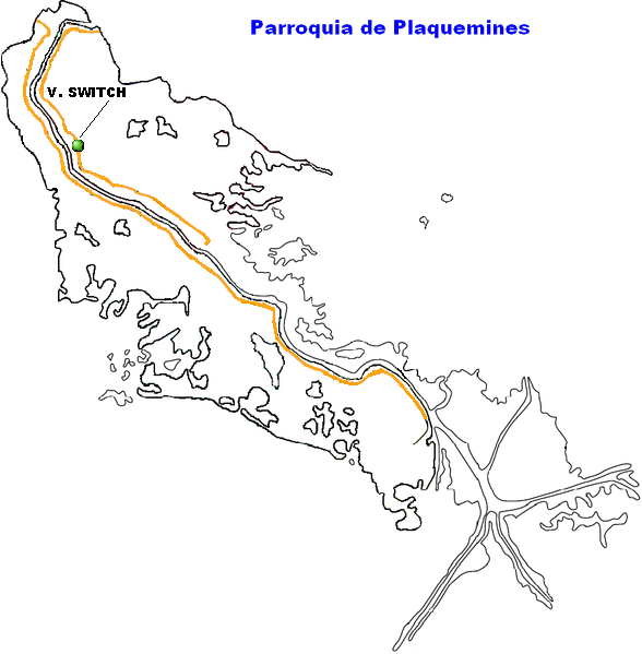 Victory Switch, Louisiana.